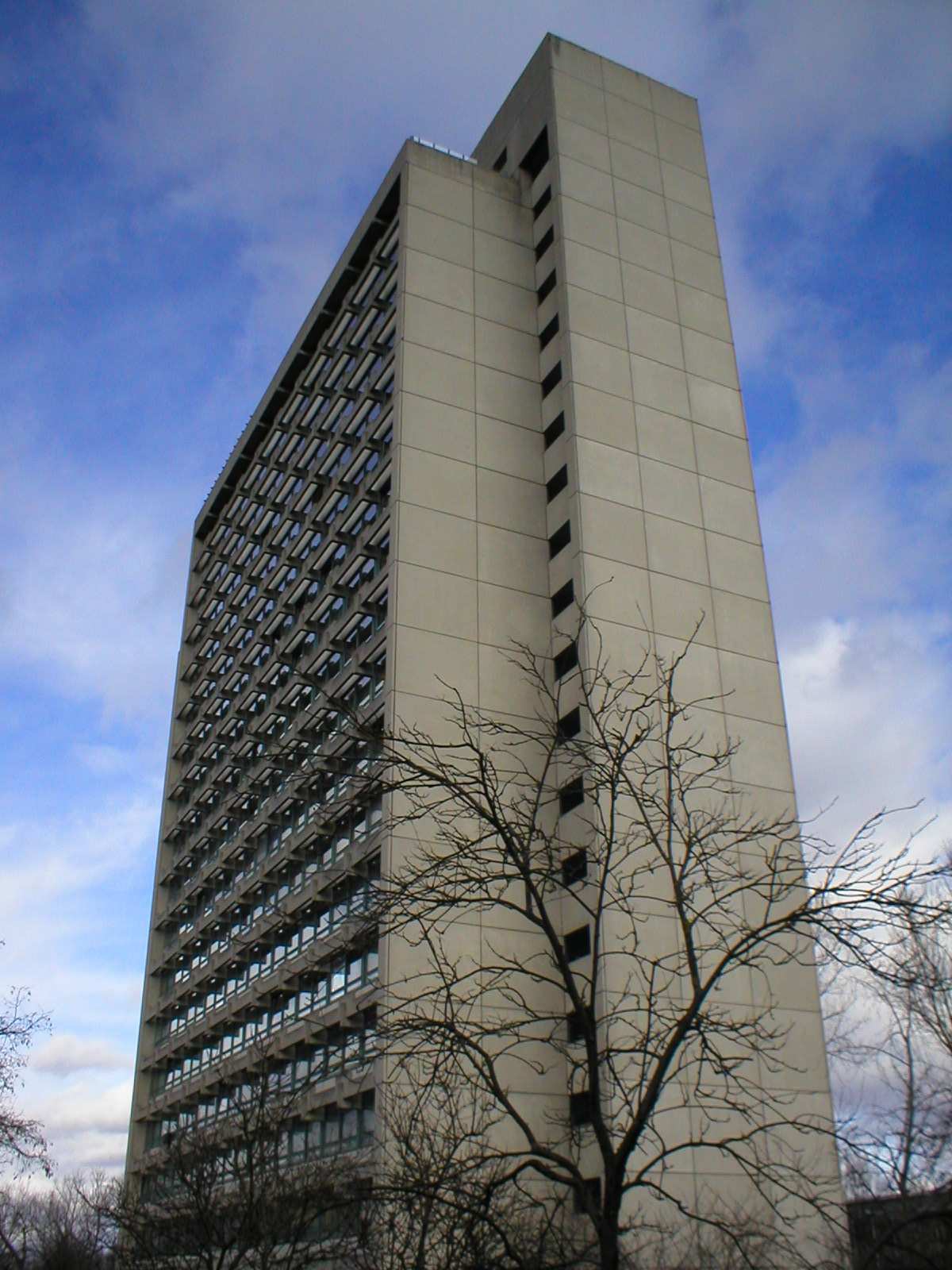 HSH in Studentenstadt